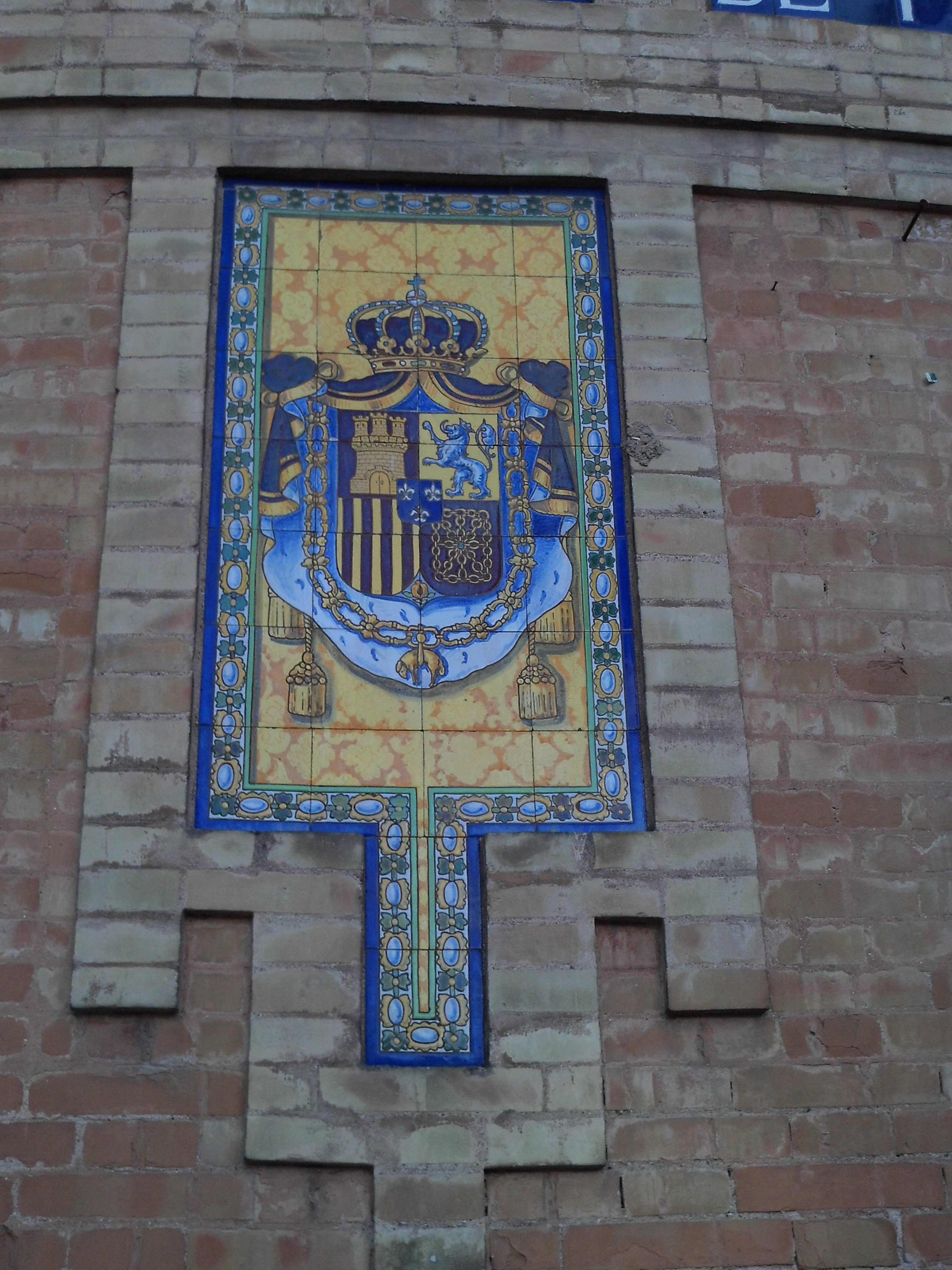 Azulejo con el escudo de España de la II República en la Real Fábrica de Tabacos de Sevilla